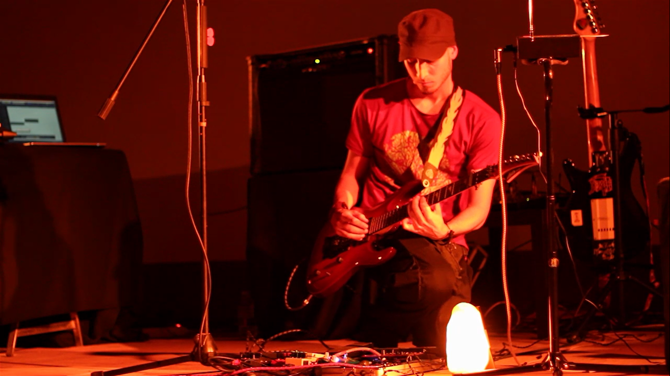 Dreamer Strings en su espectáculo "La Habitación de los Sueños" - Albacete 2015